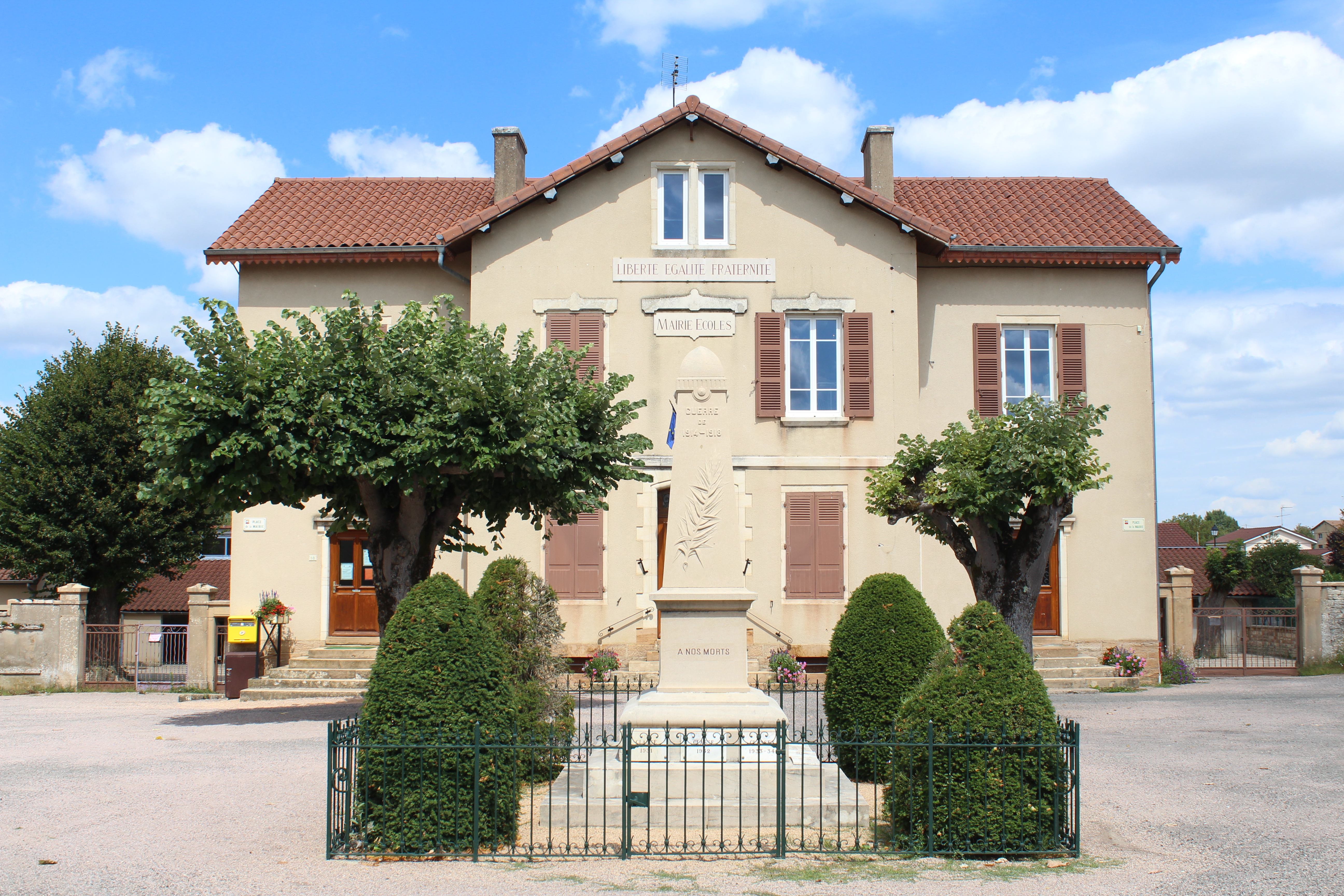 Mairie de Clessé, Saône-et-Loire.